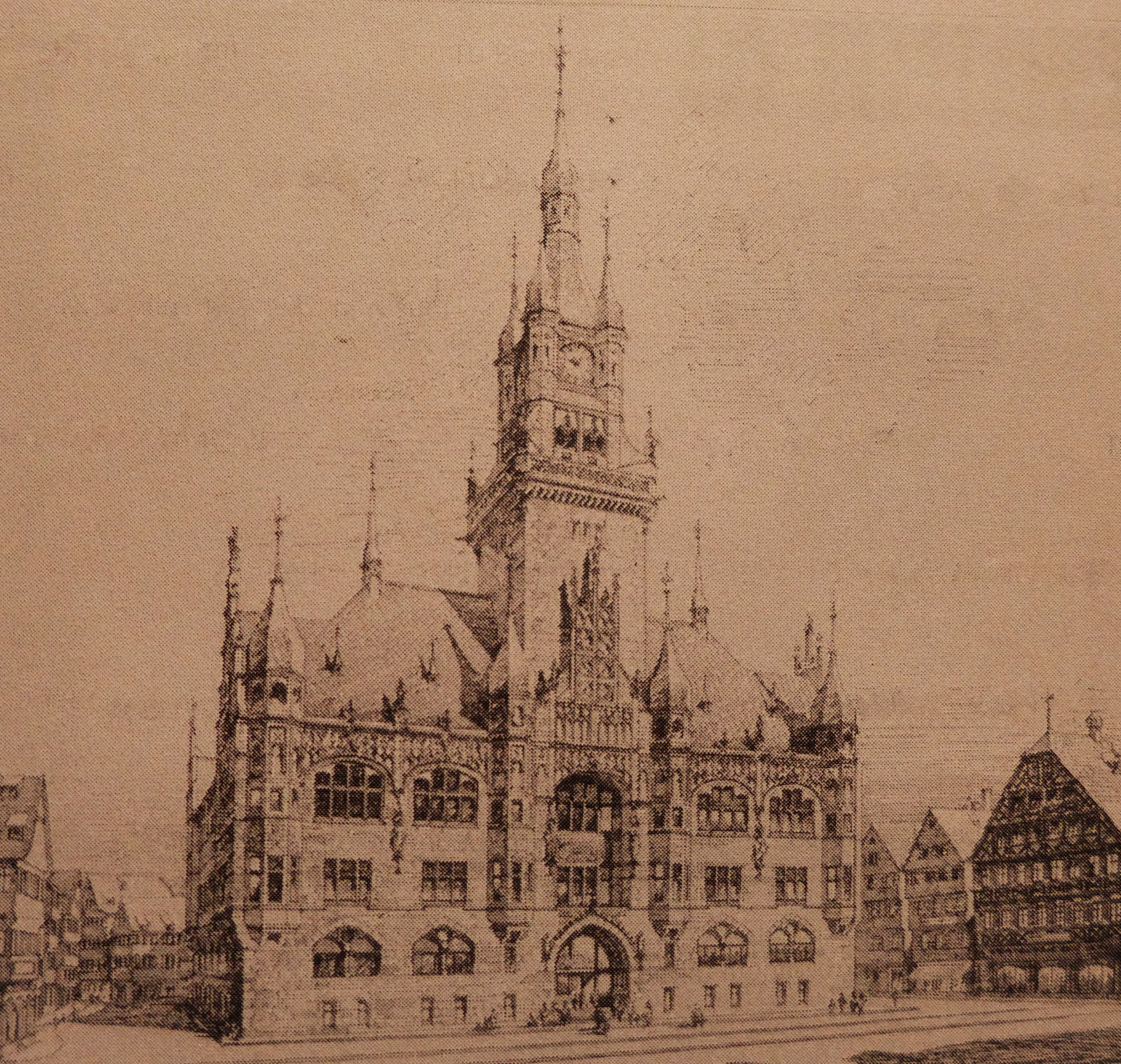 Heinrich Jassoy und Johannes Vollmer: Konkurrenzentwürfe 1895 für ein Rathaus in Stuttgart (Archiv der Technischen Universität Berlin, Architekturmuseum in der Universitätsbibliothek)